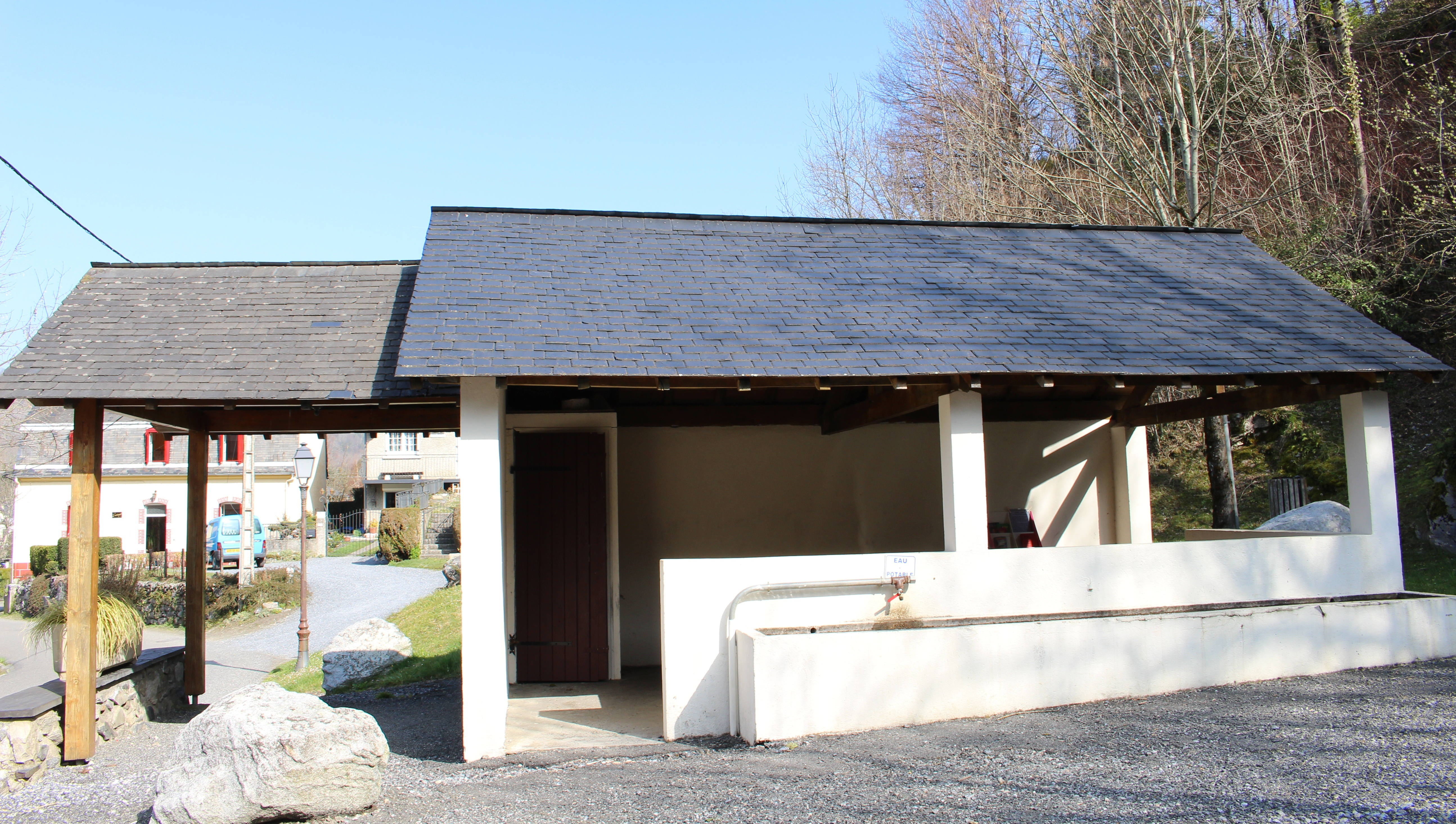 Lavoir de Ségus (Hautes-Pyrénées)